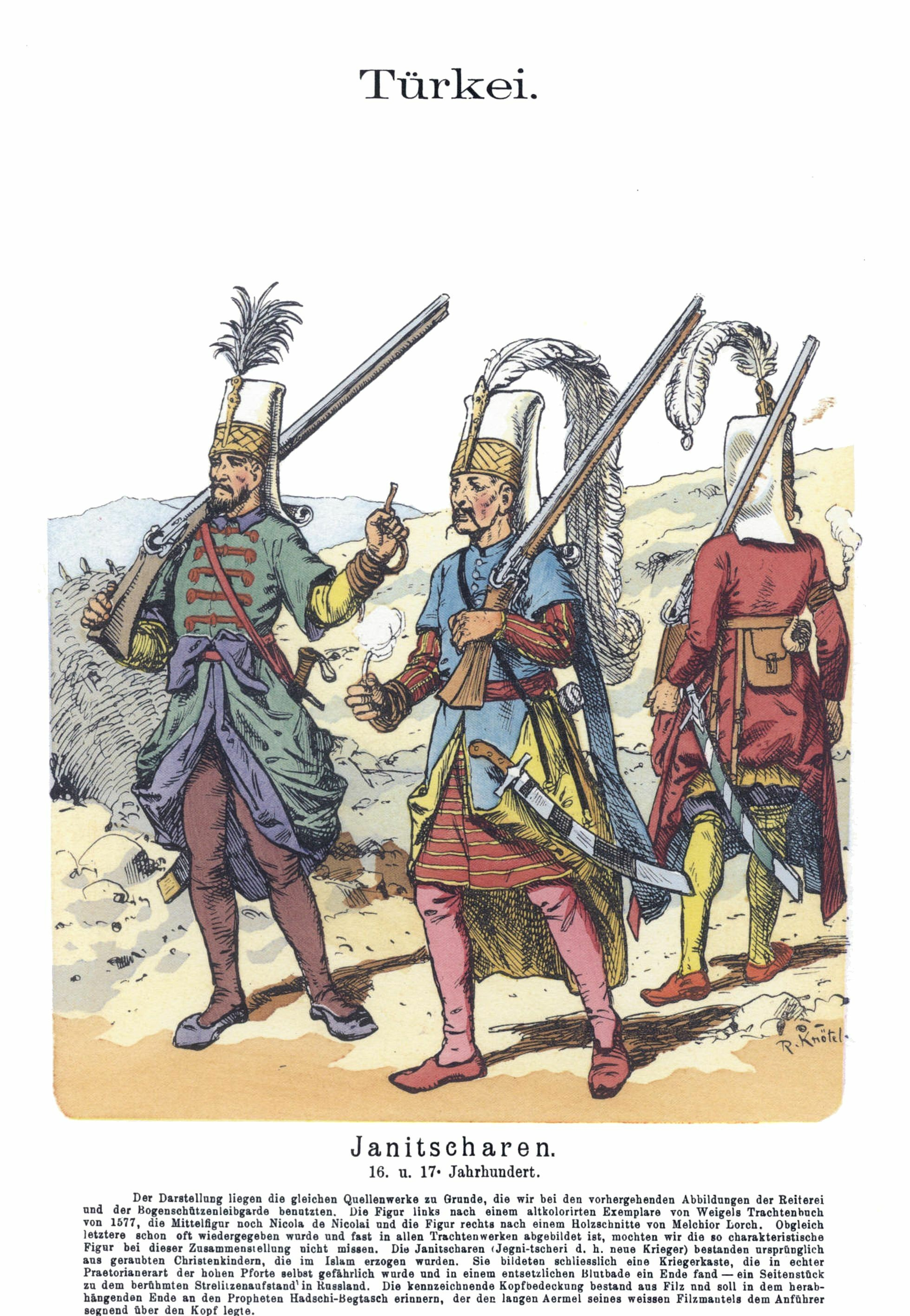 Uniformenkunde von Richard Knötel